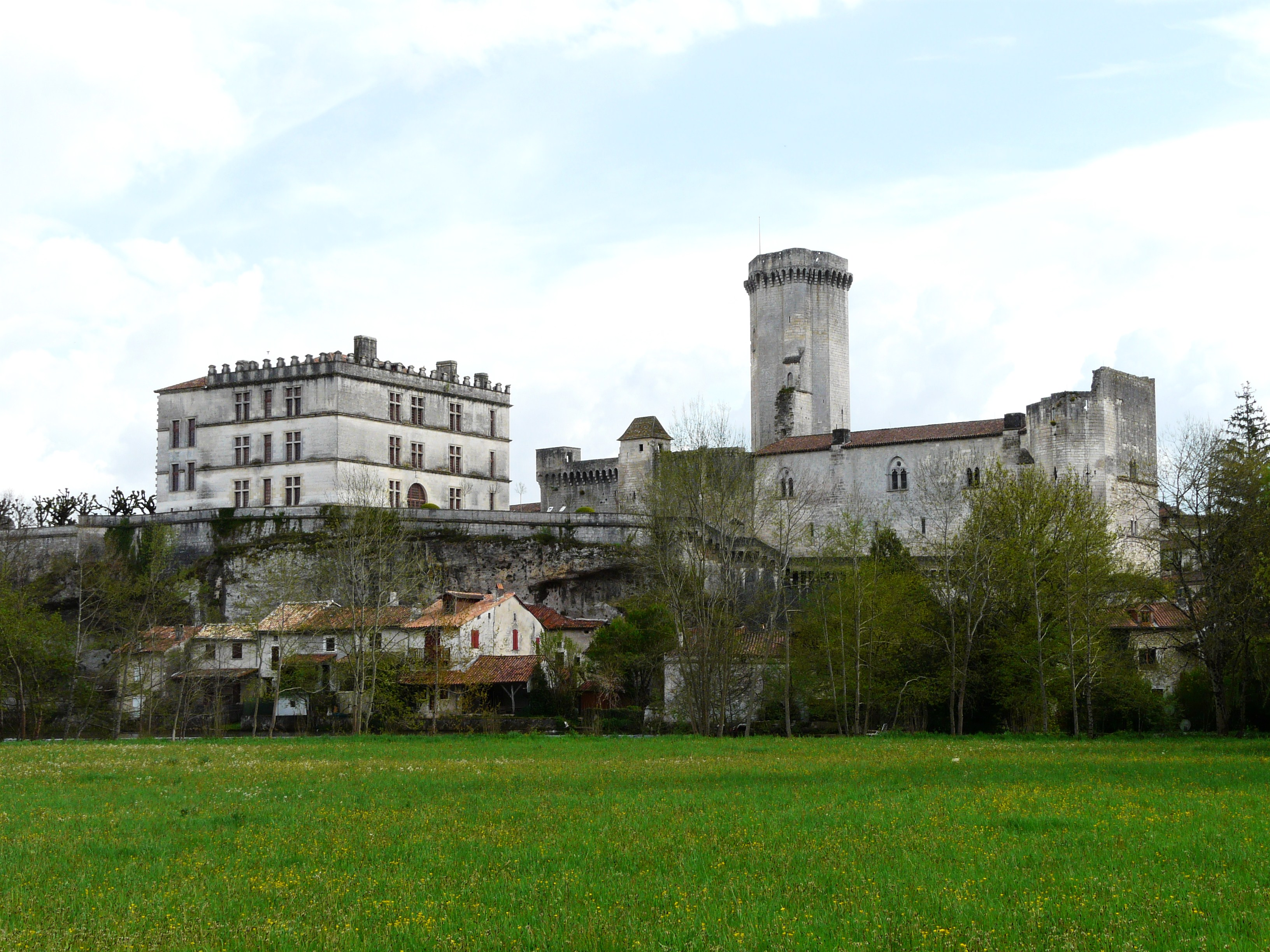 Le château Renaissance et la forteresse médiévale, château de Bourdeilles, Dordogne, France